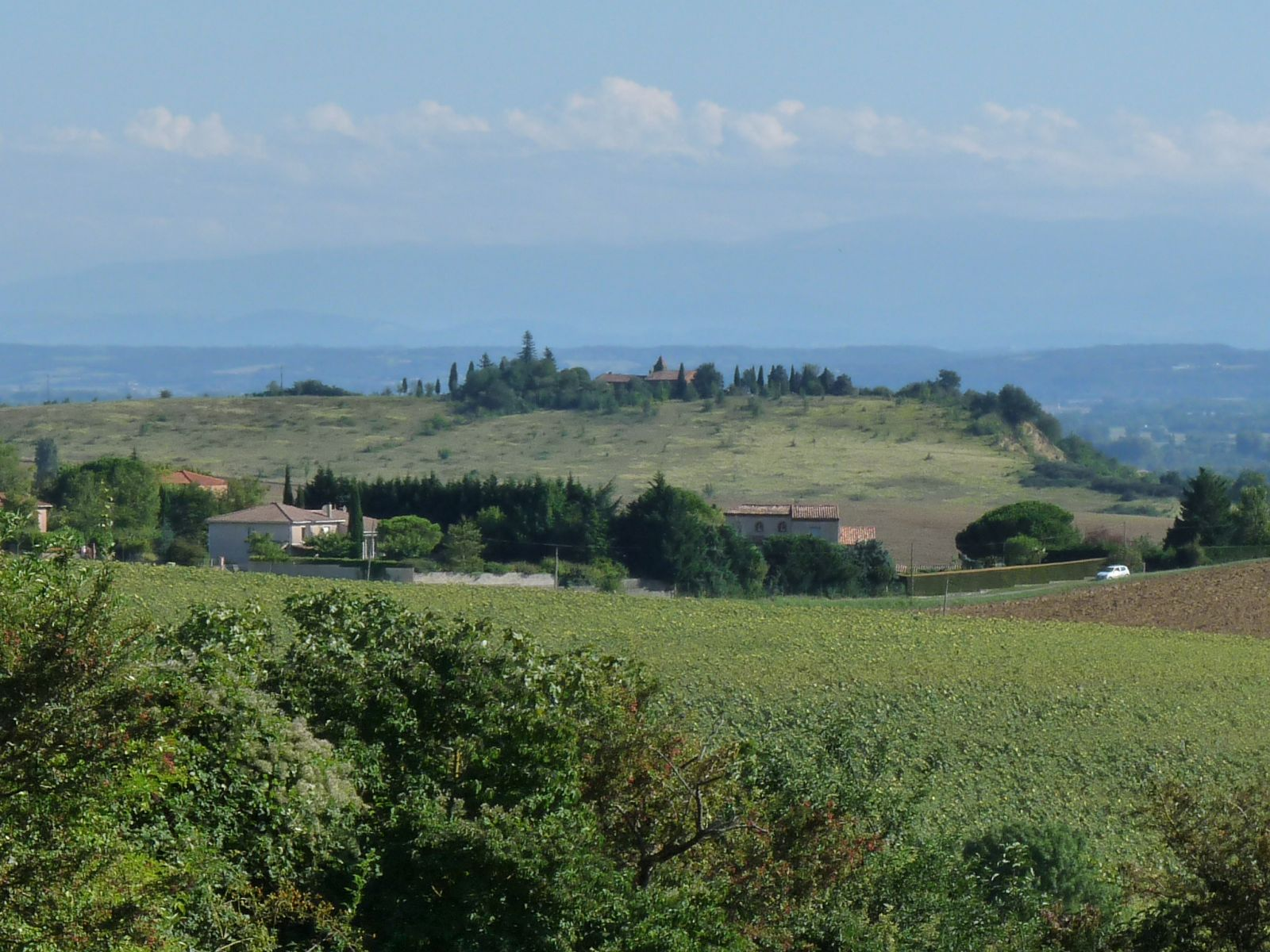 Vue sur le Lauragais et vers les Pyrénées, Goyrans, Haute-Garonne, France